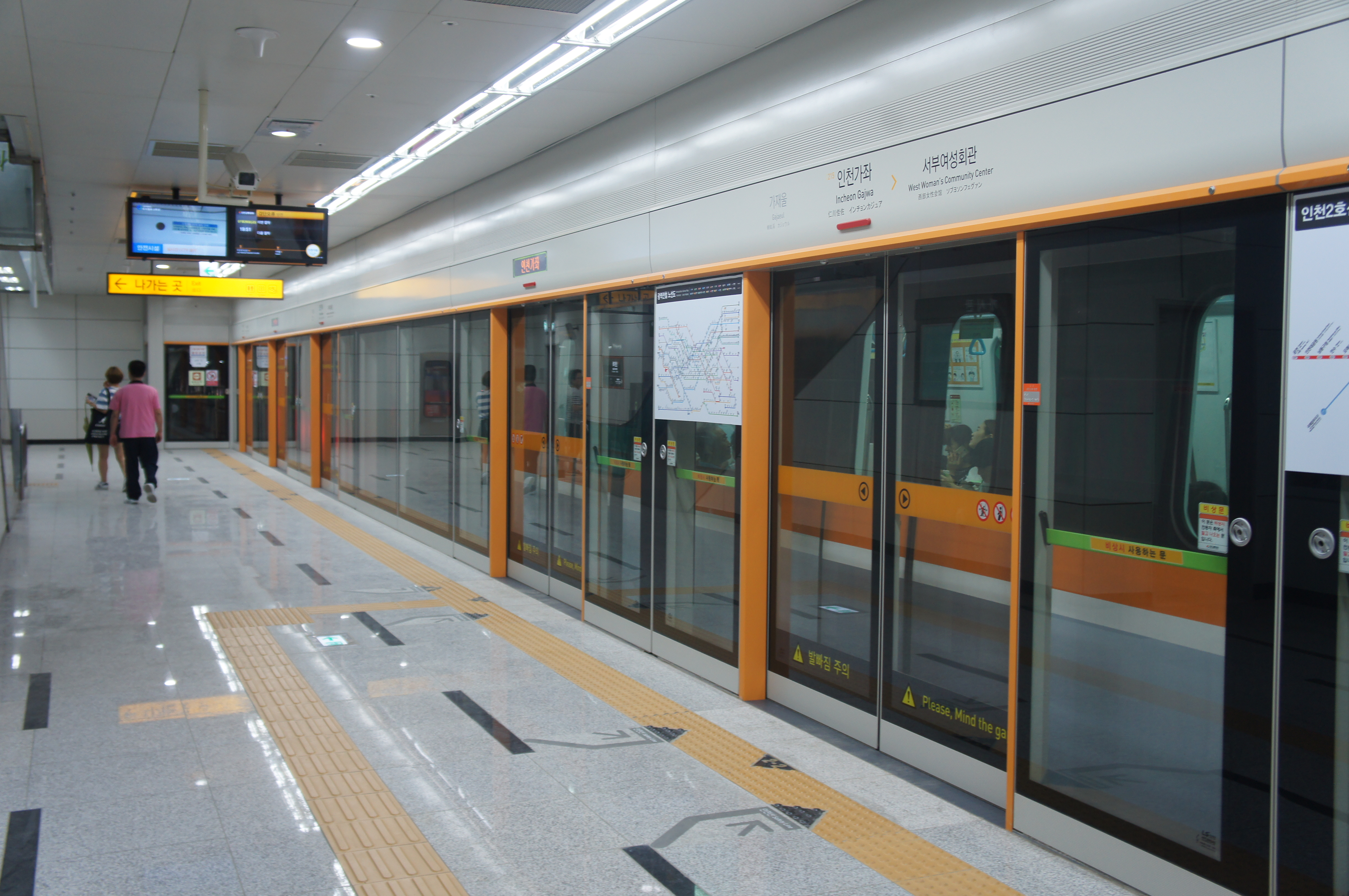 인천가좌역 승강장